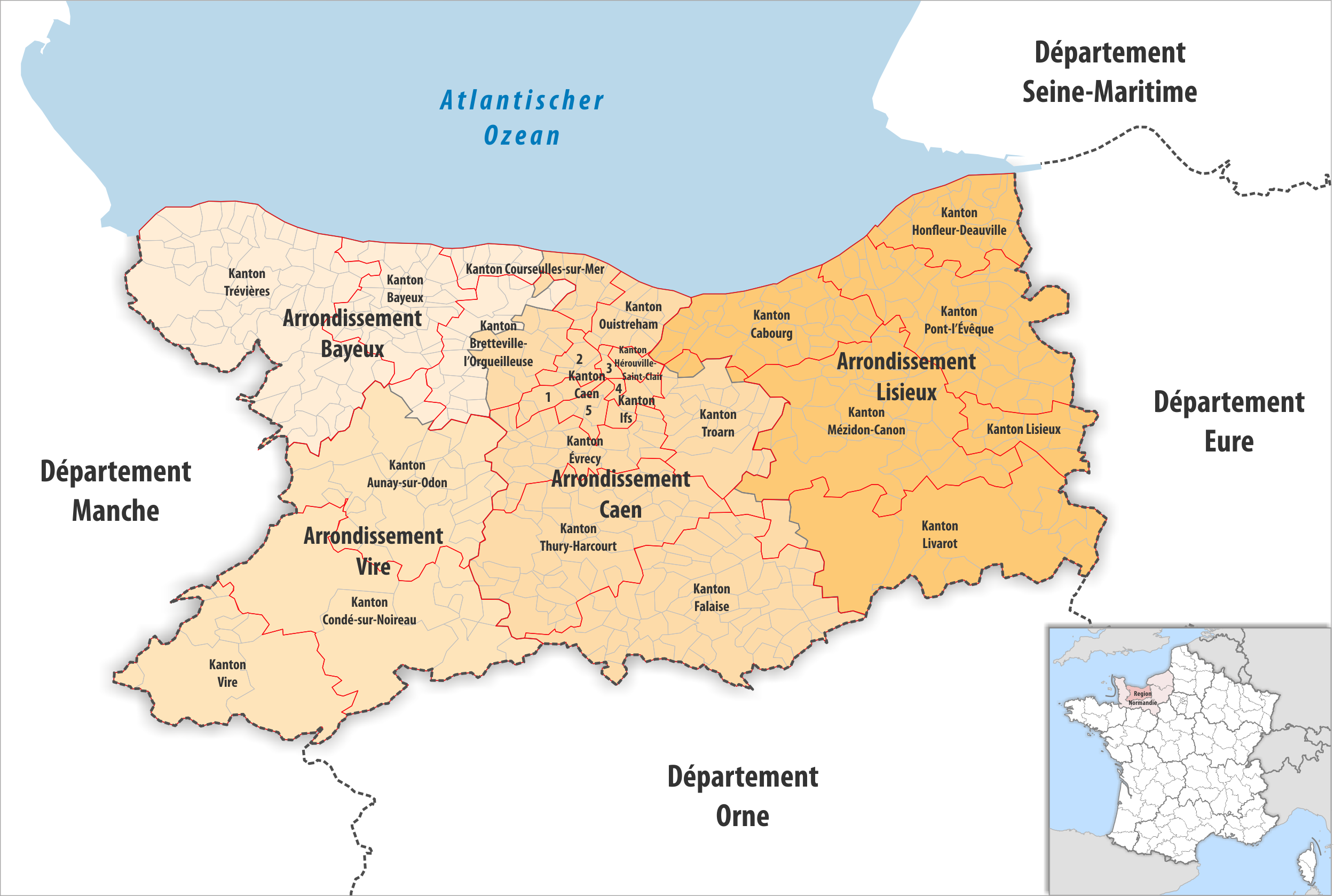 Gemeinden, Kantone und Arrondissemente im Departement Calvados